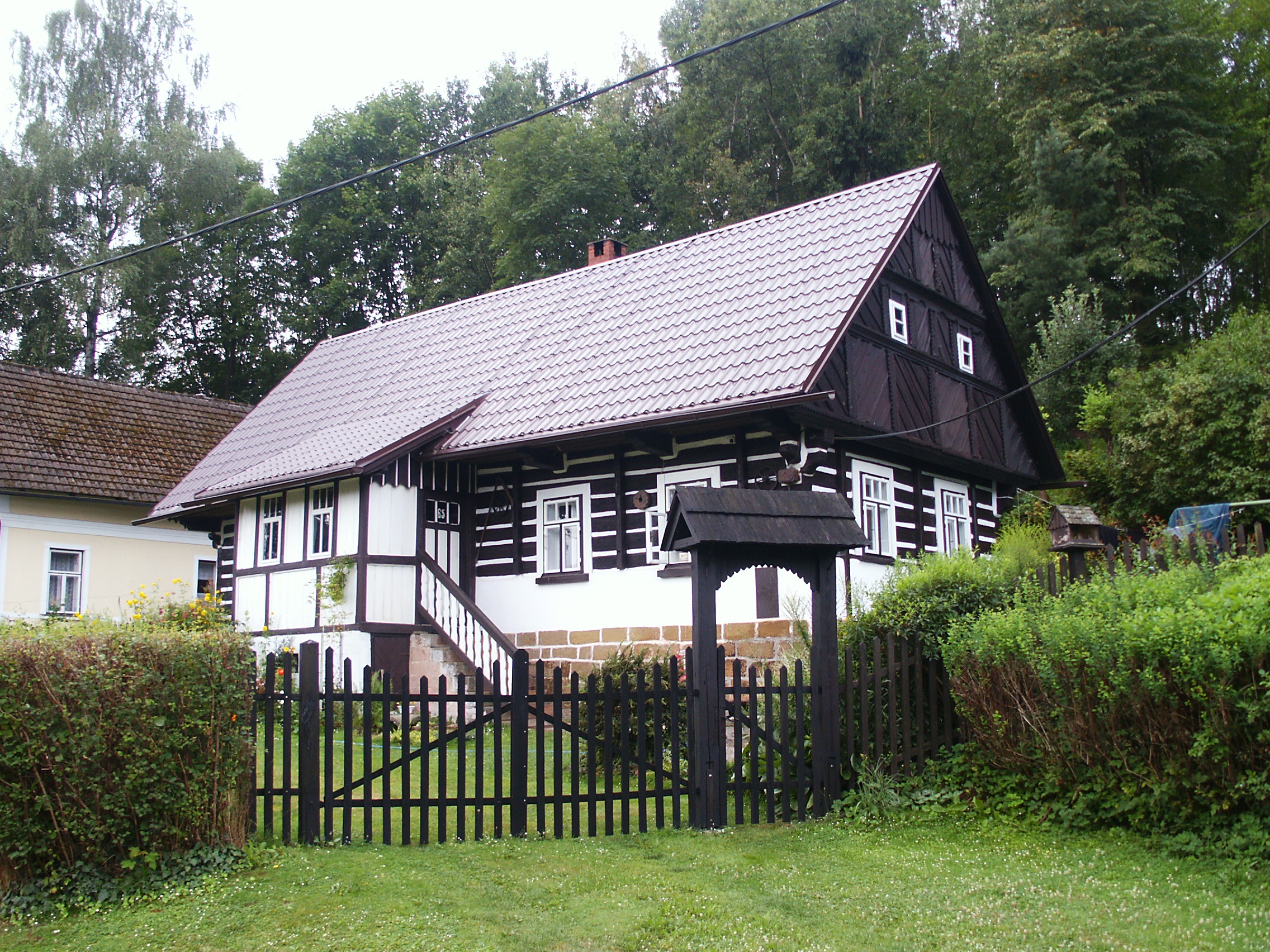 Valdov - č.p. 65